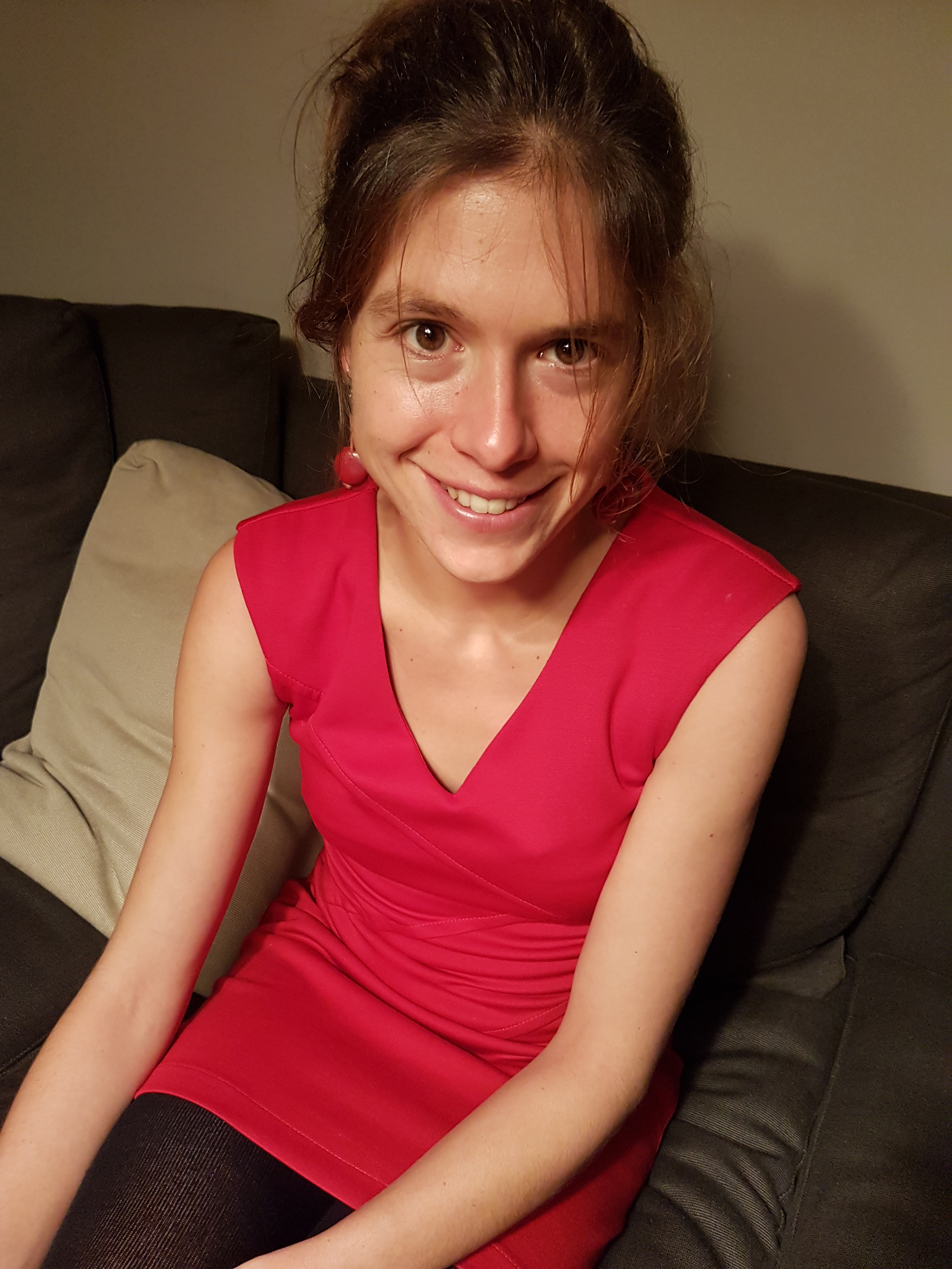 Hanna Vandenbussche